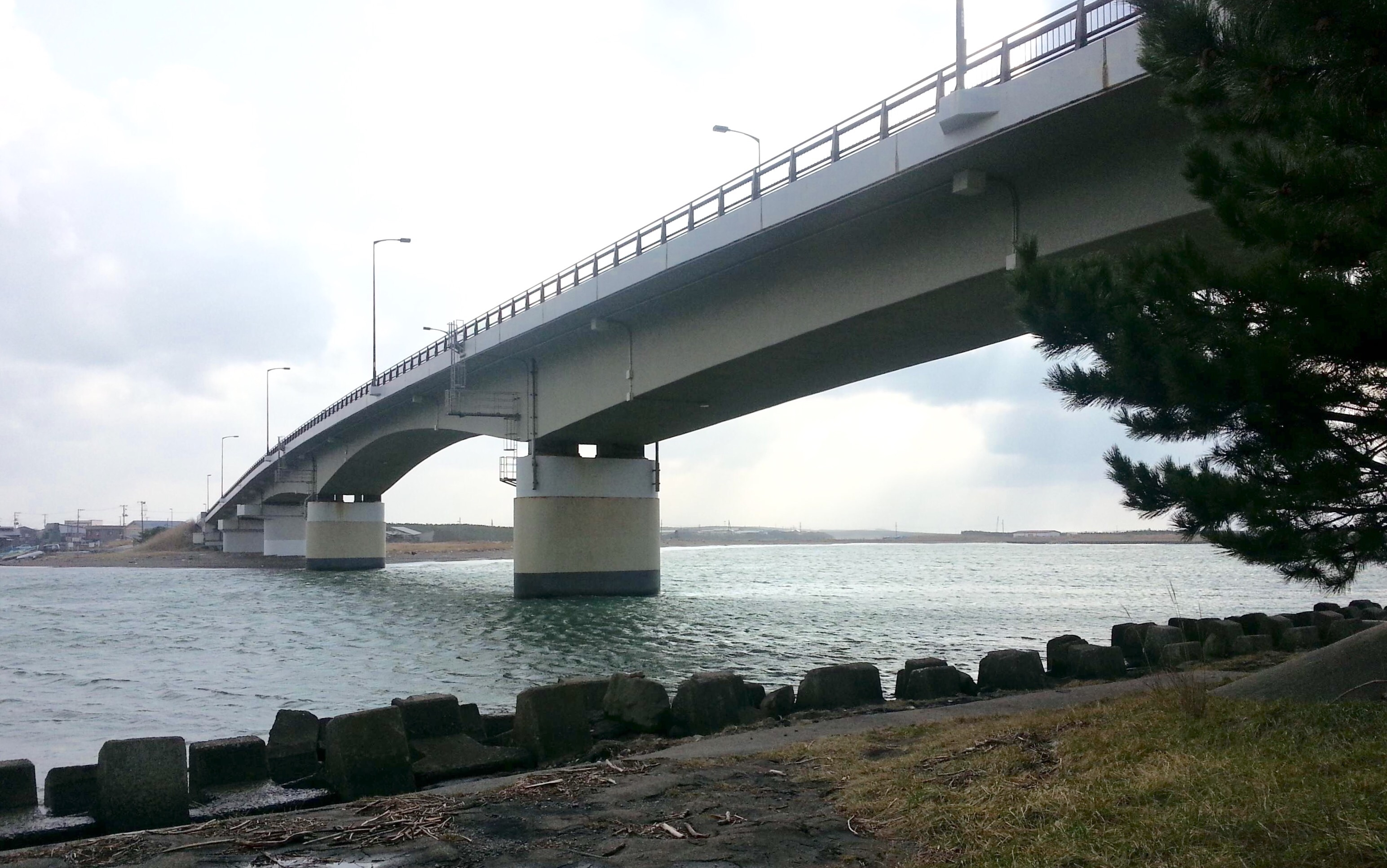 青森県の十三湖河口部（日本海との接点付近）に架かる十三湖大橋。青森県道12号が通っている。